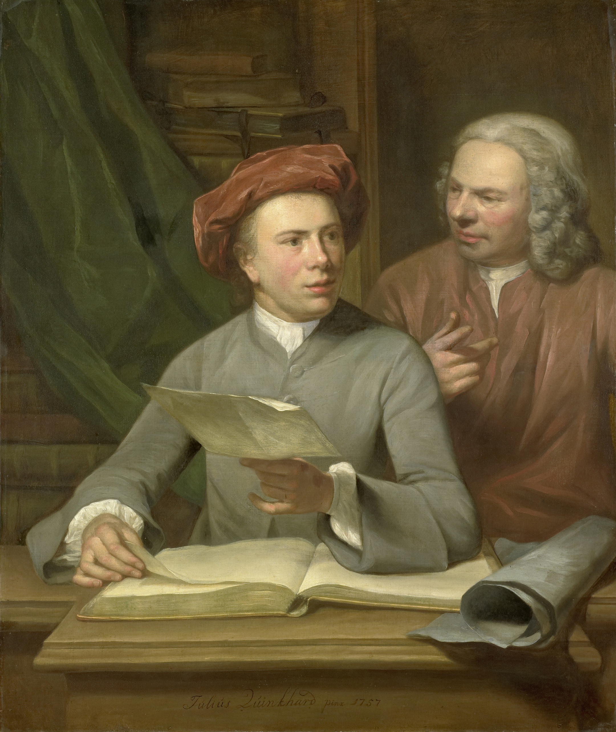 Zelfportret van de schilder Julius Henricus Quinkhard (1734-1795), met achter hem staande zijn vader en leermeester Jan Maurits Quinkhard (1688-1772). Ten halven lijve, zittend aan een tafel, een boek doorbladerend. In de linkerhand een blad papier (een tekening?).